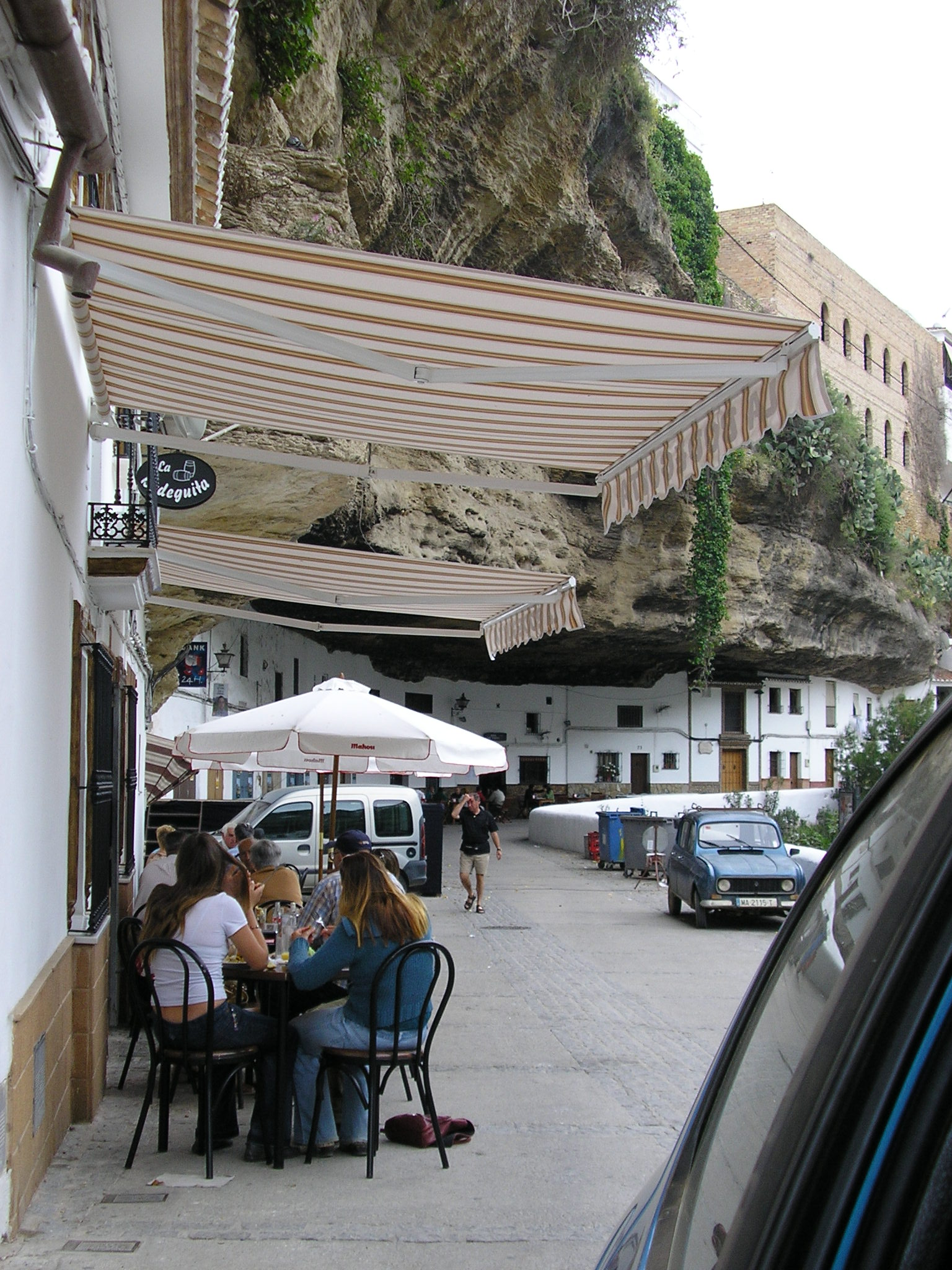 "Calle del Sol" de la ciudad de Setenil de las Bodegas en Cádiz. Fotografia realizada en abril de 2007